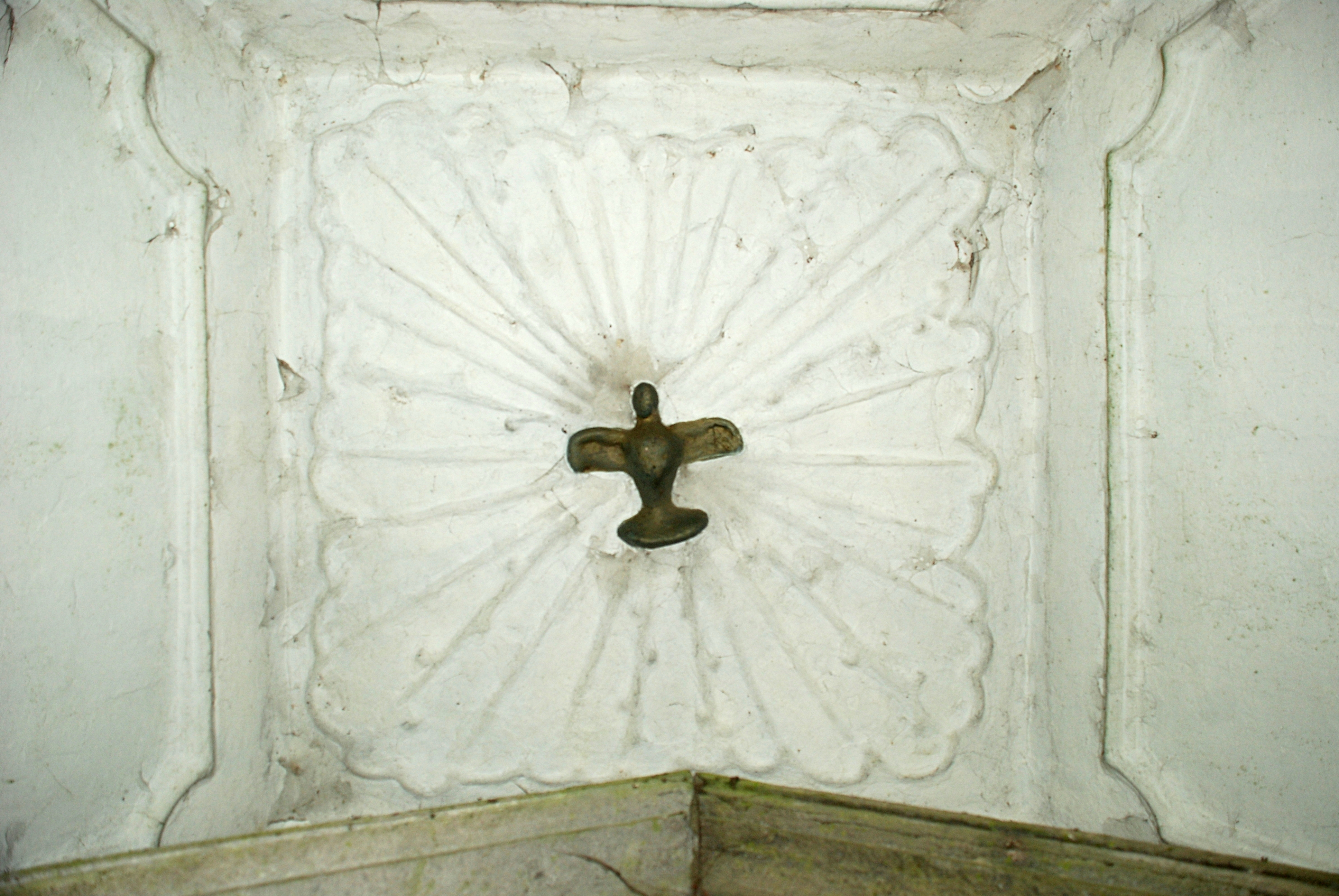 Belgique - Brabant wallon - Villers-la-Ville - Chapelle Notre-Dame des Affligés